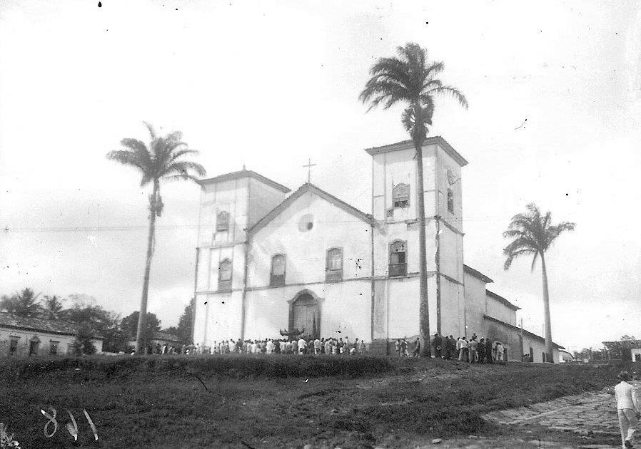 Procissão de Ramos realizada pela Irmandade do Santíssimo no século XX.